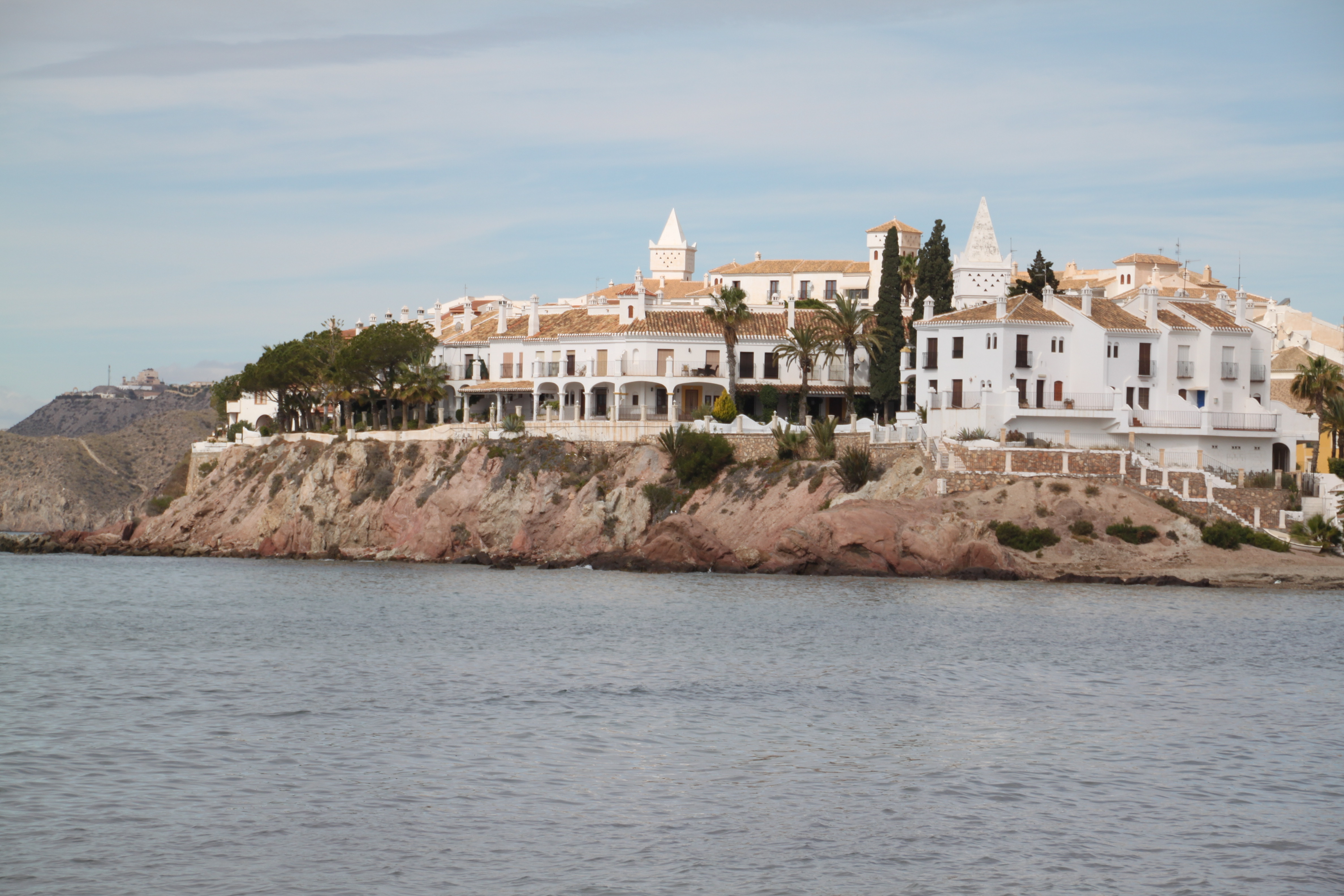 Imagen de Calabardina, Águilas (Región de Murcia, España)